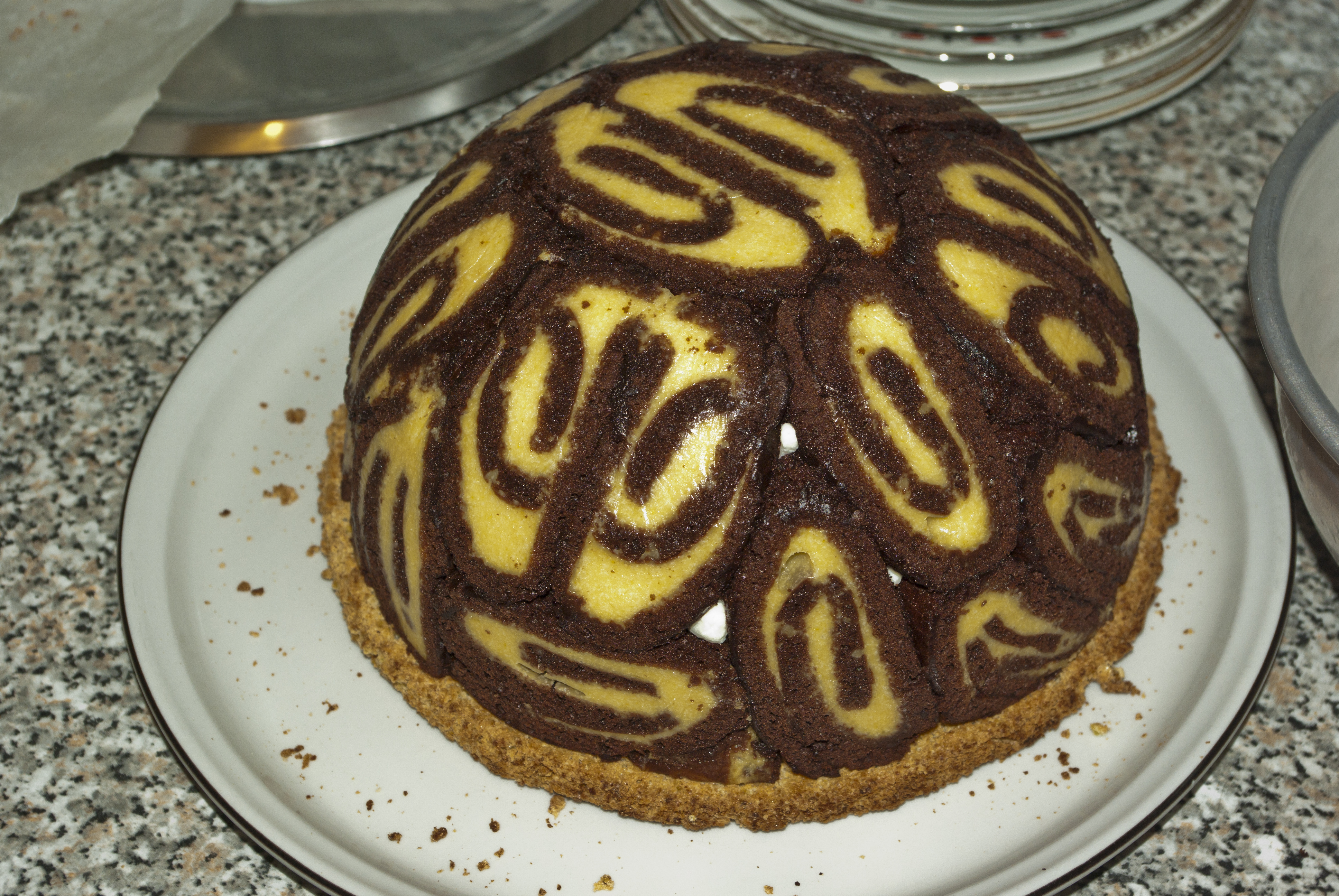 White cholocate zuccotto and pistacchio daquoise.